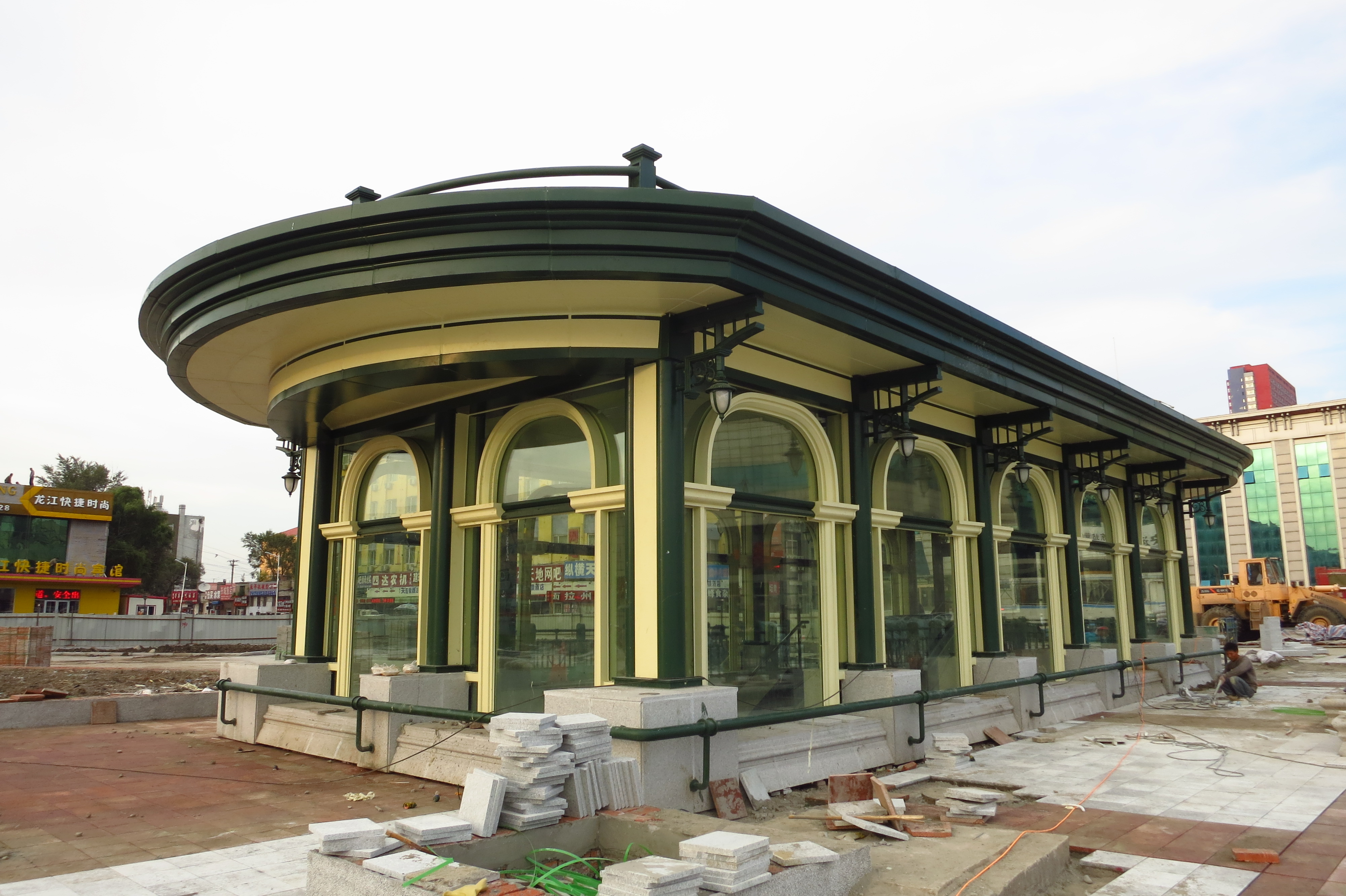 巡道工出品 photo by Xundaogong 地铁一号线 哈尔滨东站出入口